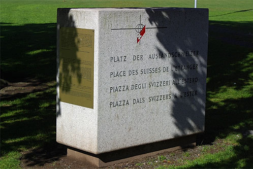 Platz der Auslandschweizer in Brunnen (Nr. 03.1-8785)